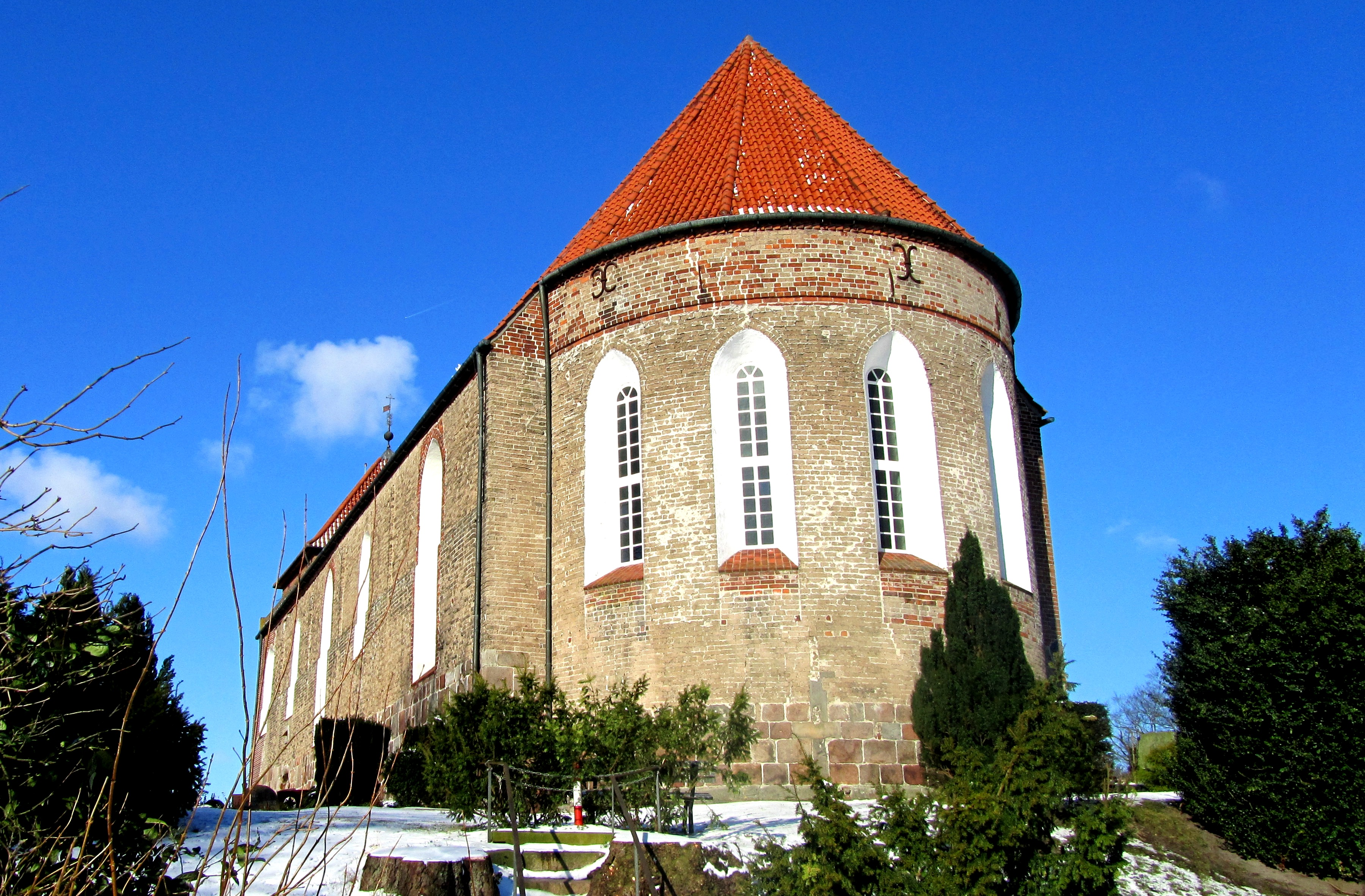 Chor der St.-Stephanus-Kirche in Schortens, Niedersachsen, Deutschland